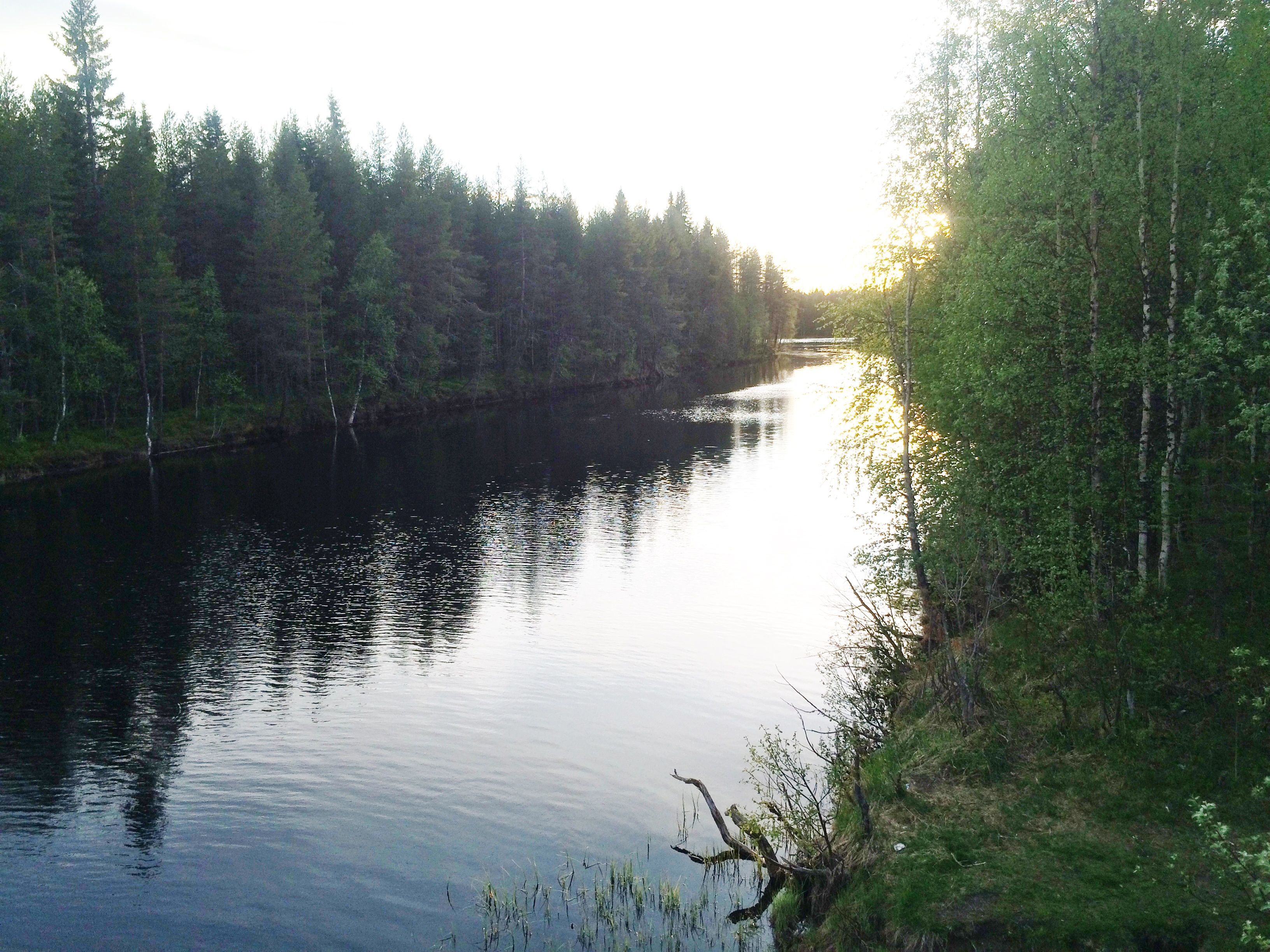 река Ухта (Калевальская)